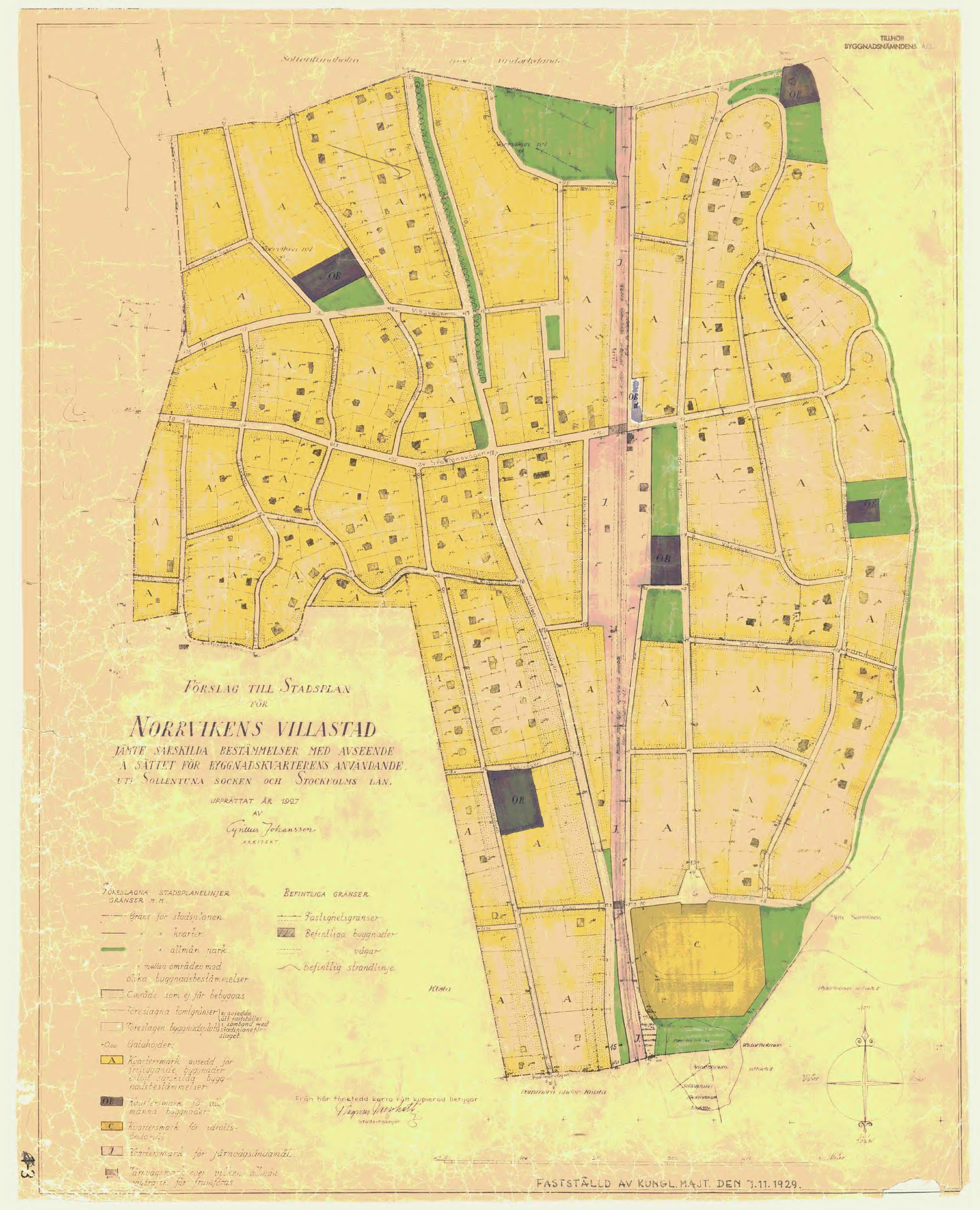 Stadsplan norrvikens villastad